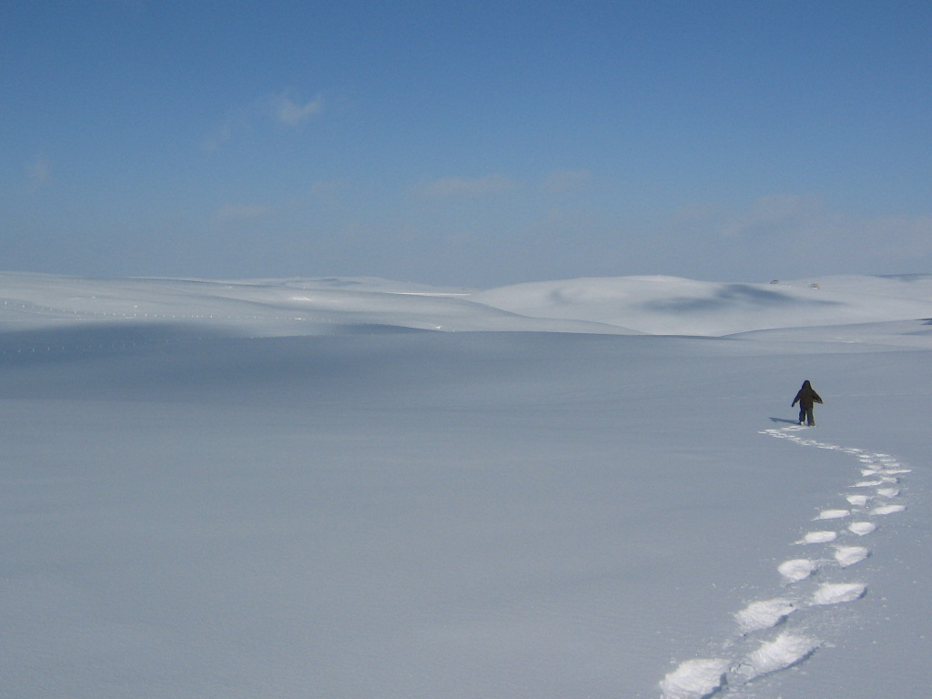 Promenade en raquettes non loin de la station de Laguiole (Aubrac, Massif central, France)